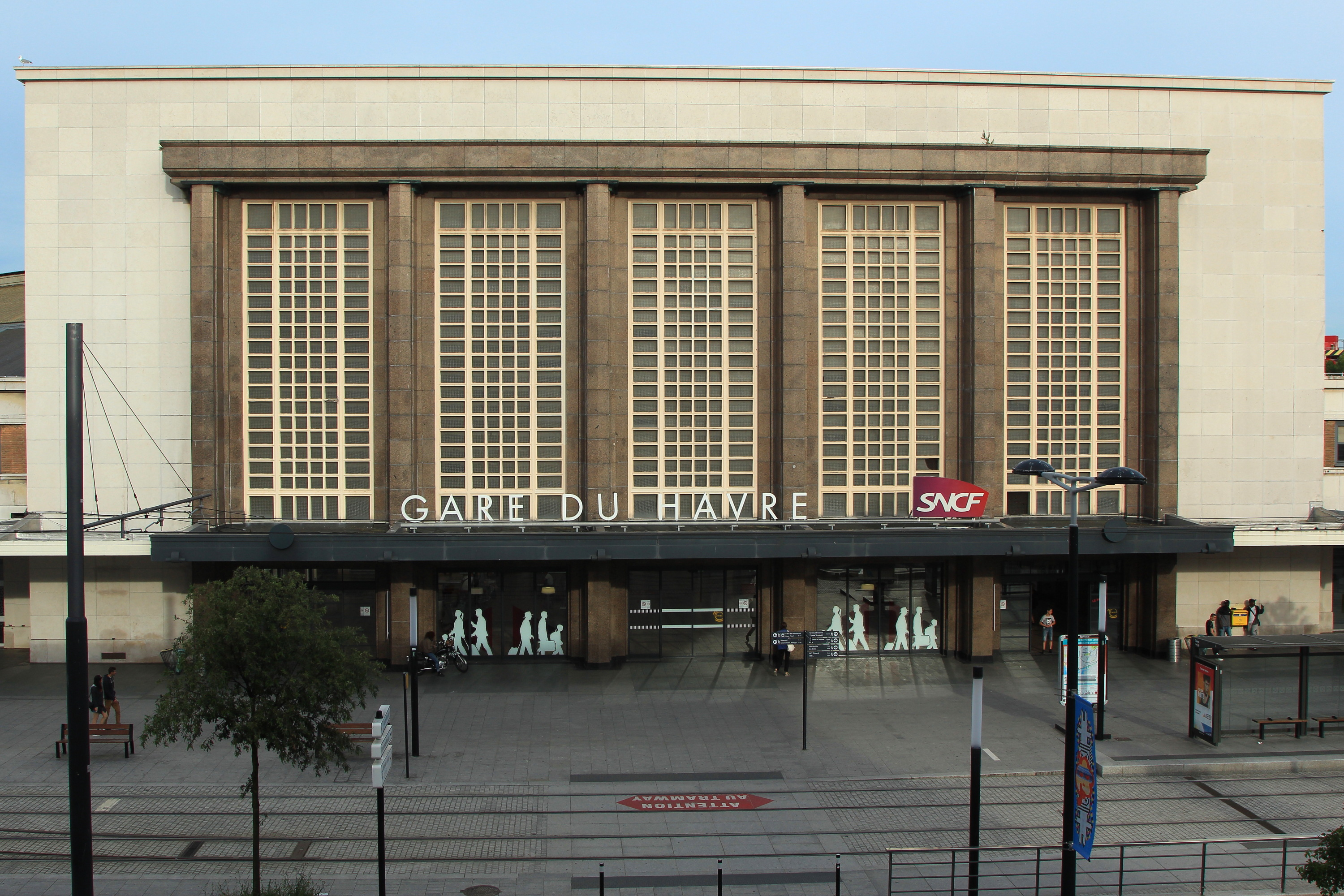 Bâtiment voyageurs de la gare du Havre.